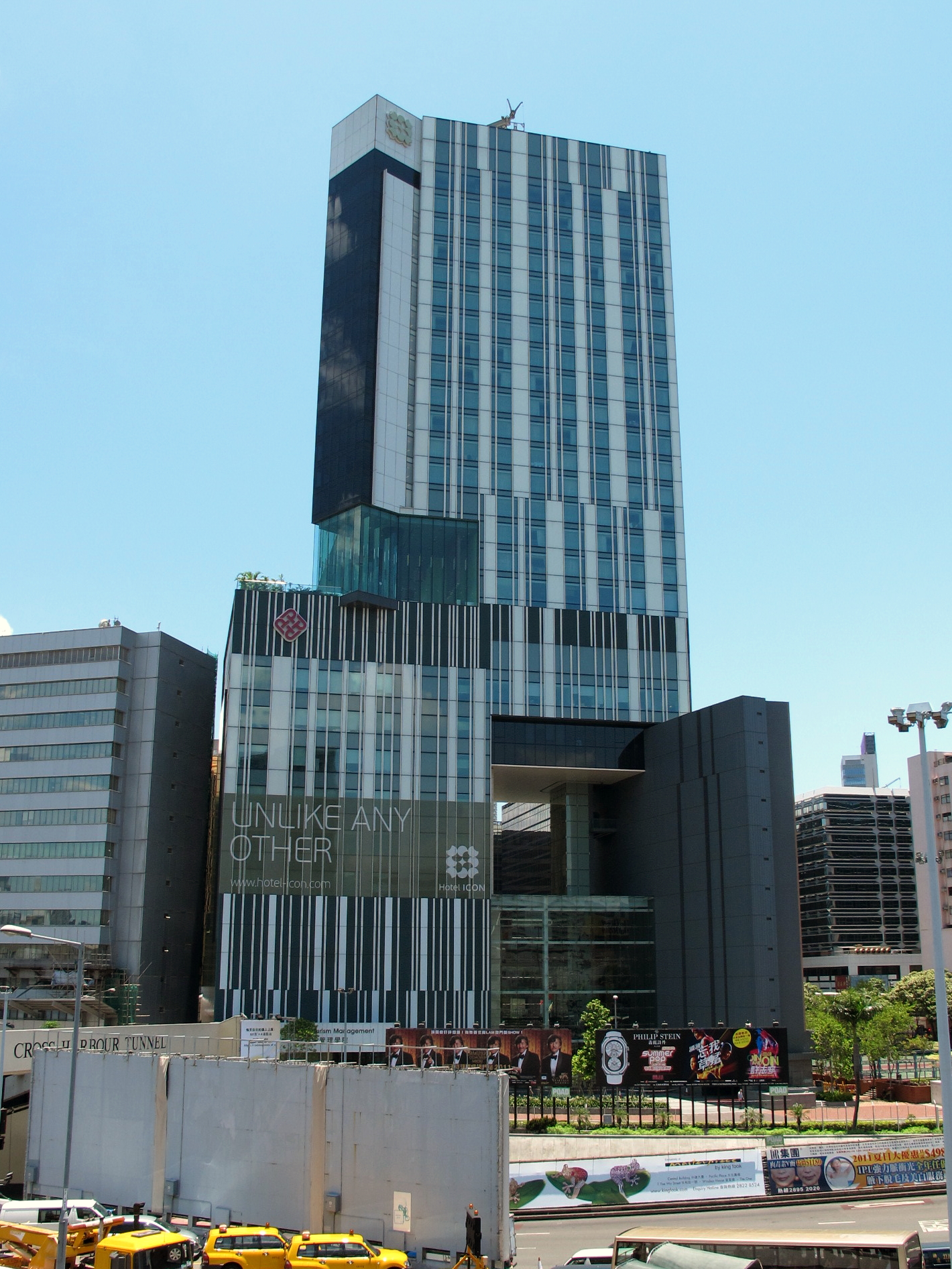 唯港薈 Hotel ICON